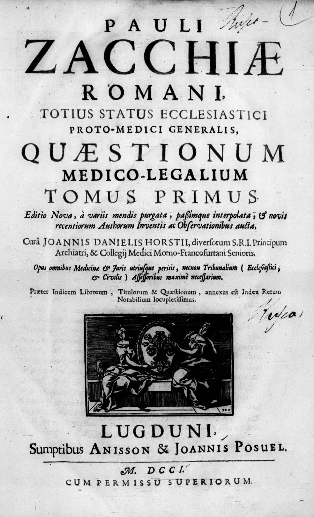 Frontespizio